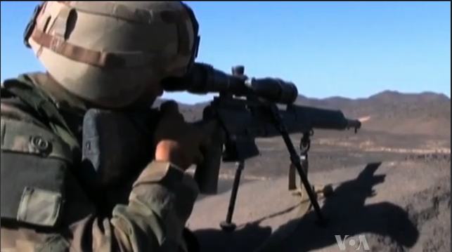 Tireur de précision français pendant l'opération Panthère en février-mars 2013.